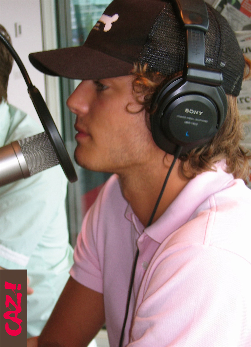 Dutch singer Jim Bakkum